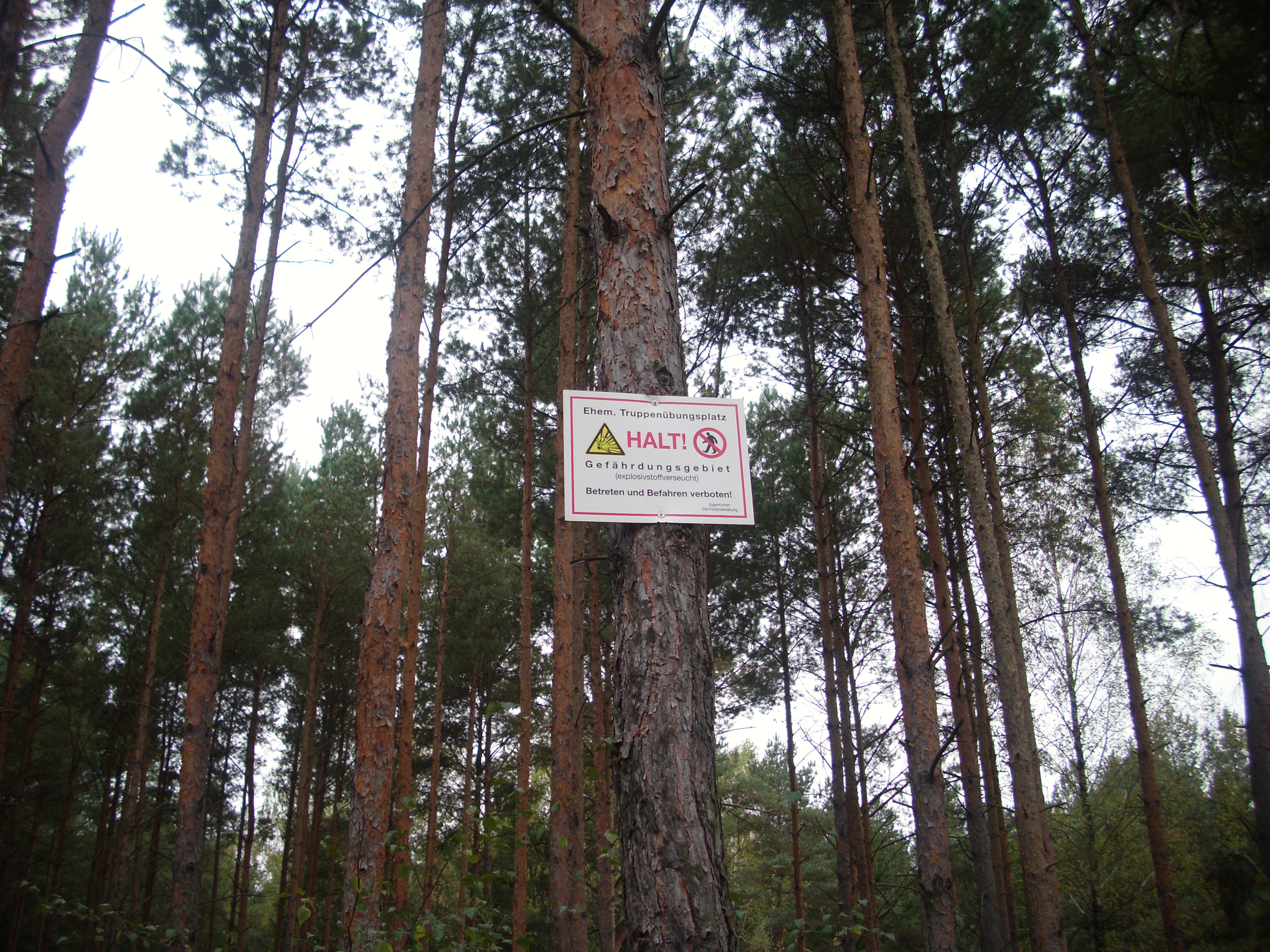 Hinweistafel Munitionsbelastung, ehemaliger Truppenübungsplatz in der Reicherskreuzer Heide